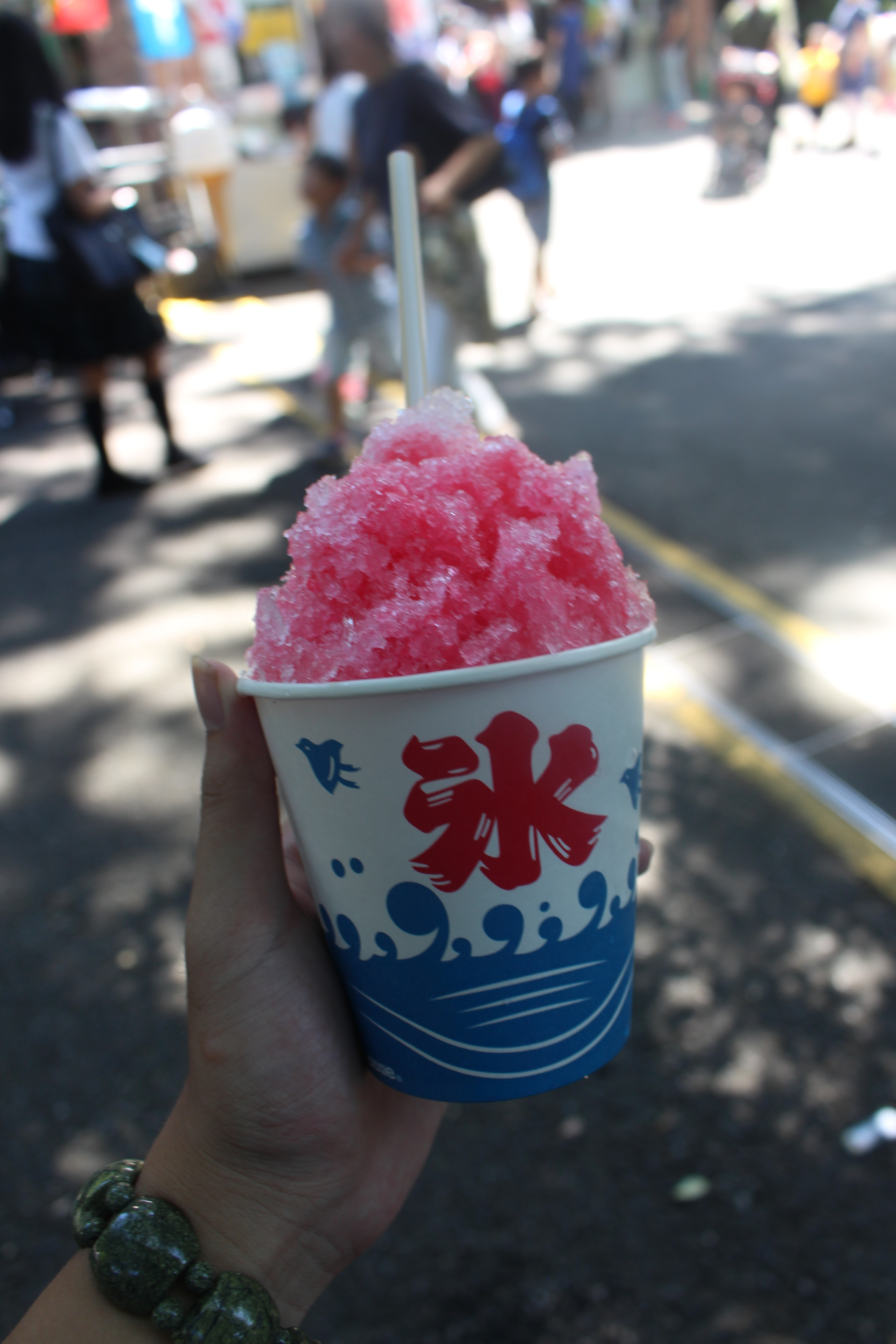 東京上野動物園 Ueno Zoo,Tokyo